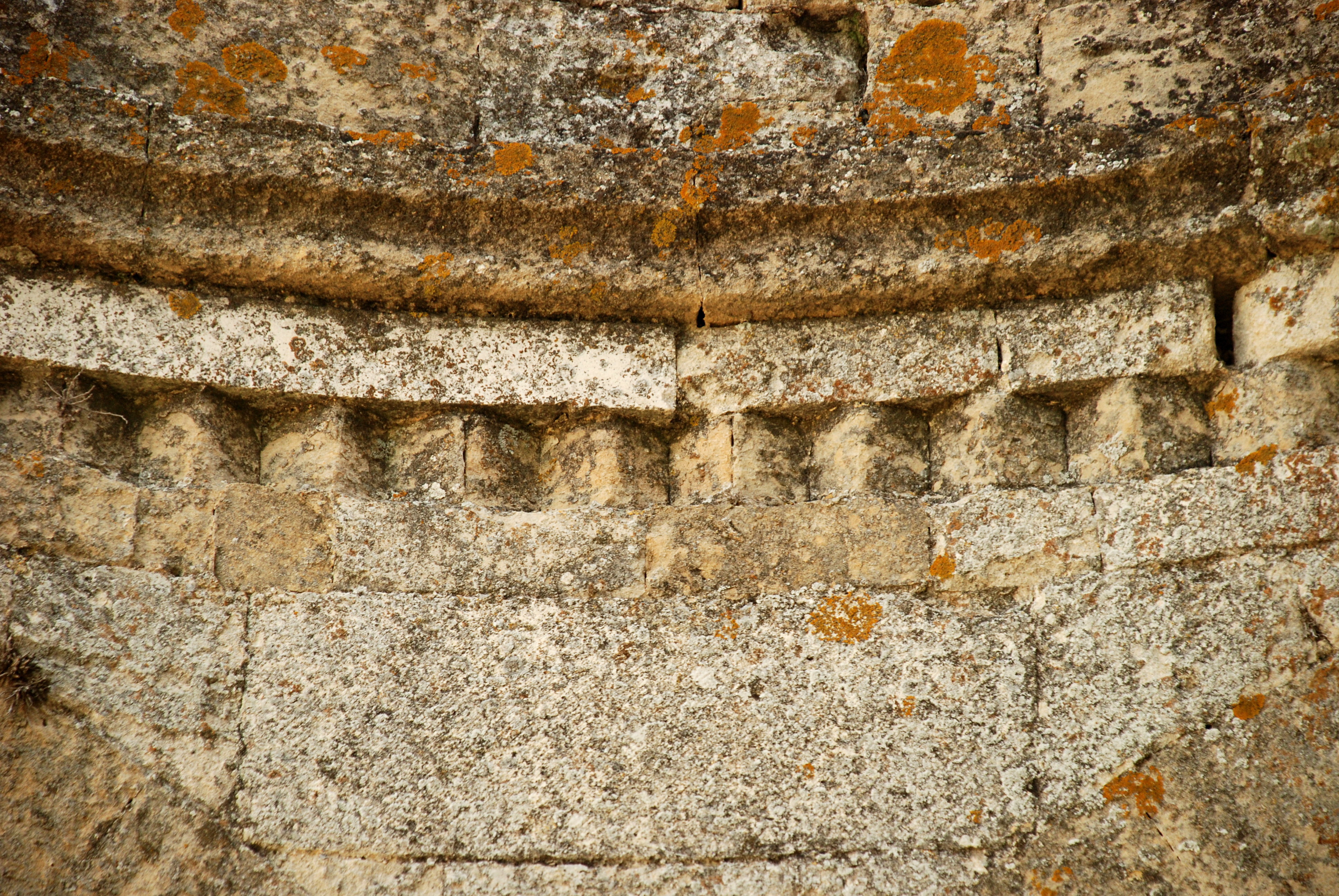 France - Gard - Chapelle Saint-Martin de Saint-Victor-la-Coste